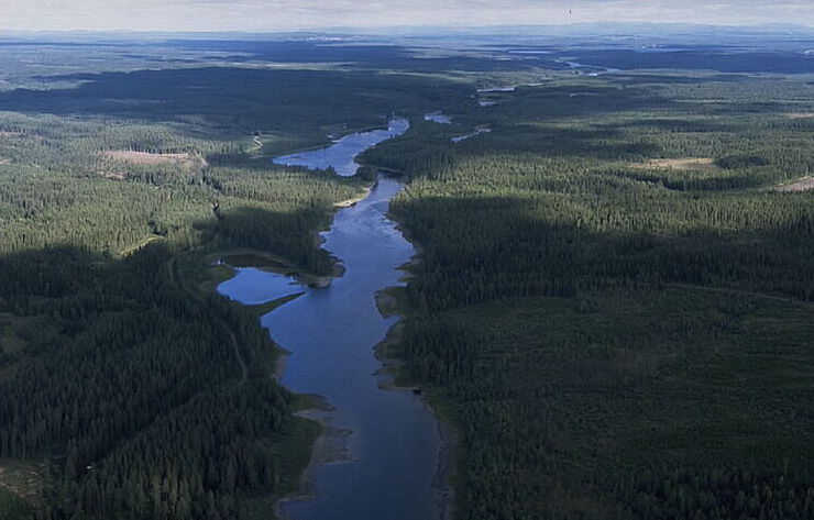 Hårkan Motiv: Aspnäset Nyckelord: Flygbilder, Riksintressen Kategori: Skogslandskap Hårkan.